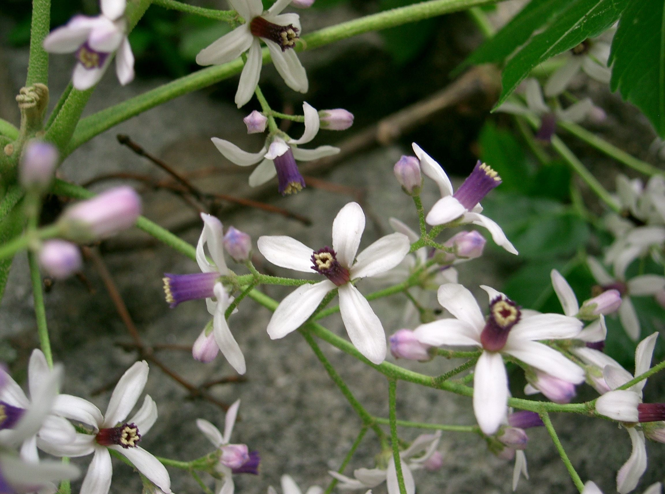 Melia azederach